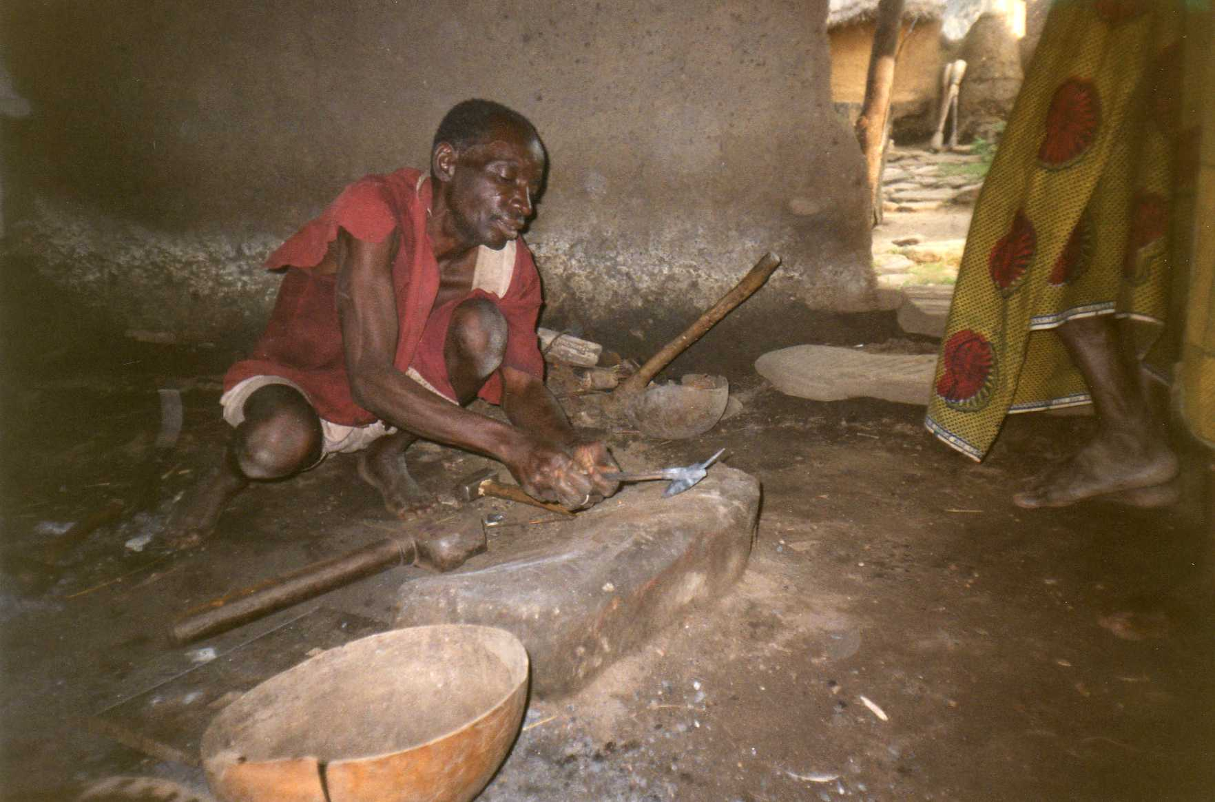 Fabbro a lavoro nel villaggio Yaka, presso i Taneka del Benin. Foto di Cristina Cassese